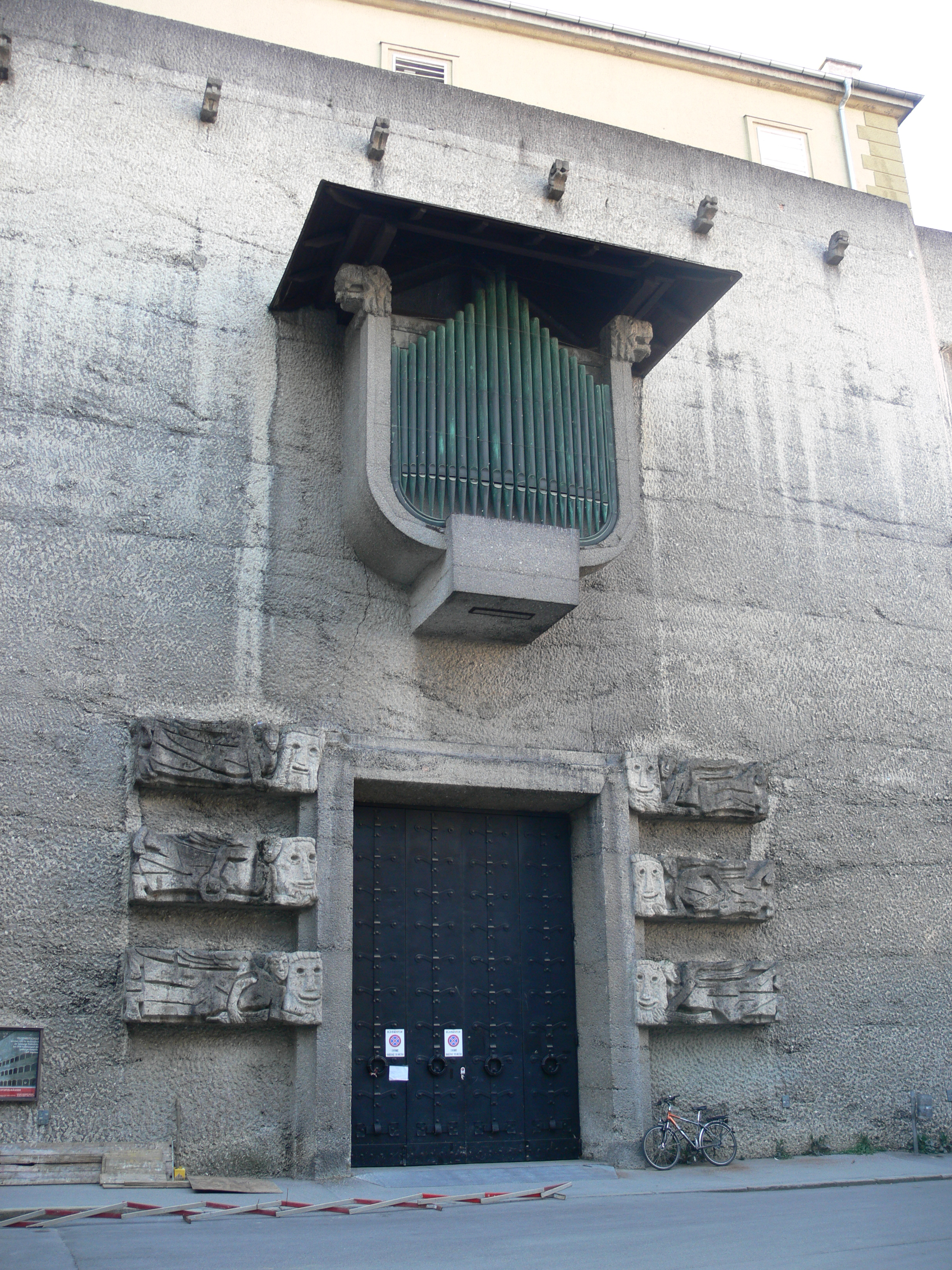 Seitenfassade des Salzburger Festspielhauskomplexes zum Toscaninihof mit Portal und Orgel Betonreliefs "Maskenhaltende Genien" von Jakob Adlhart (1938 zerstört, 1979 von Adlhart rekonstruiert) Die Orgel über dem Portal wurde vor dem Bau des Großen Festspielhauses in den Schlechtwettervorstellungen des "Jedermann" benutzt.